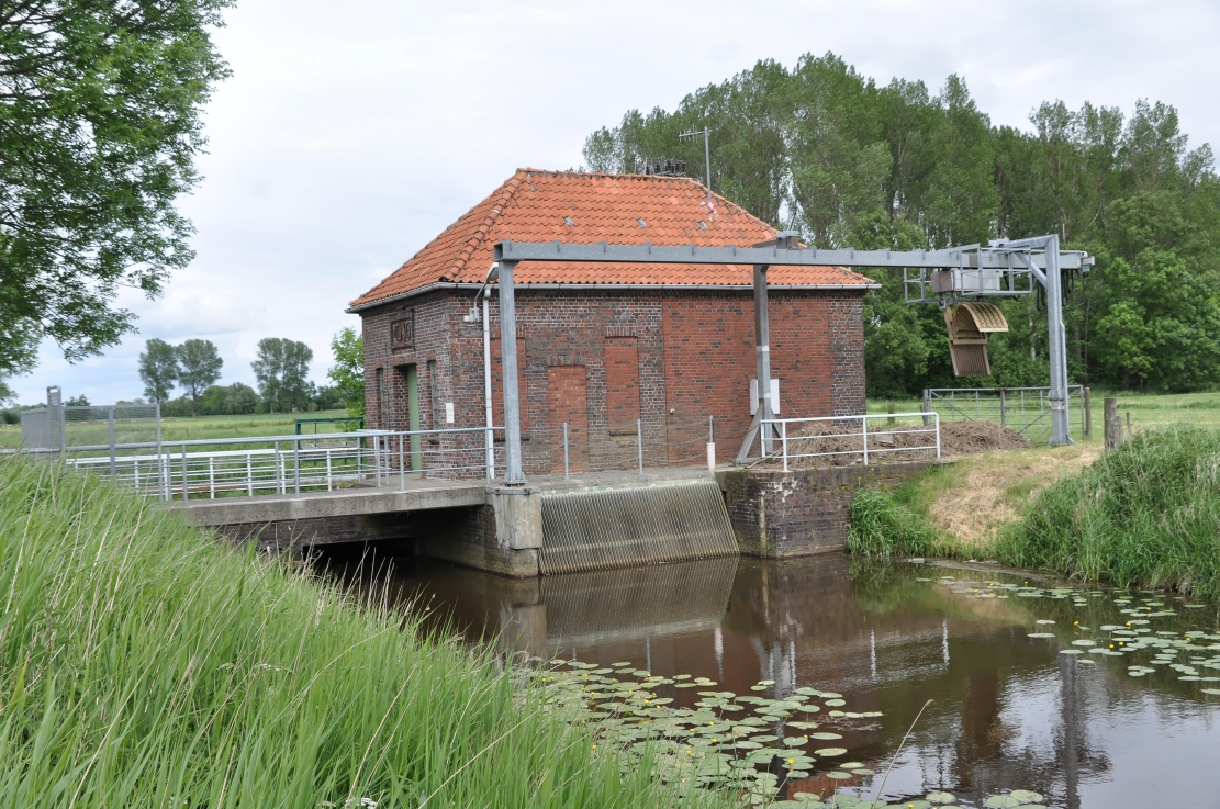 Bilder Nordleda 2012 05